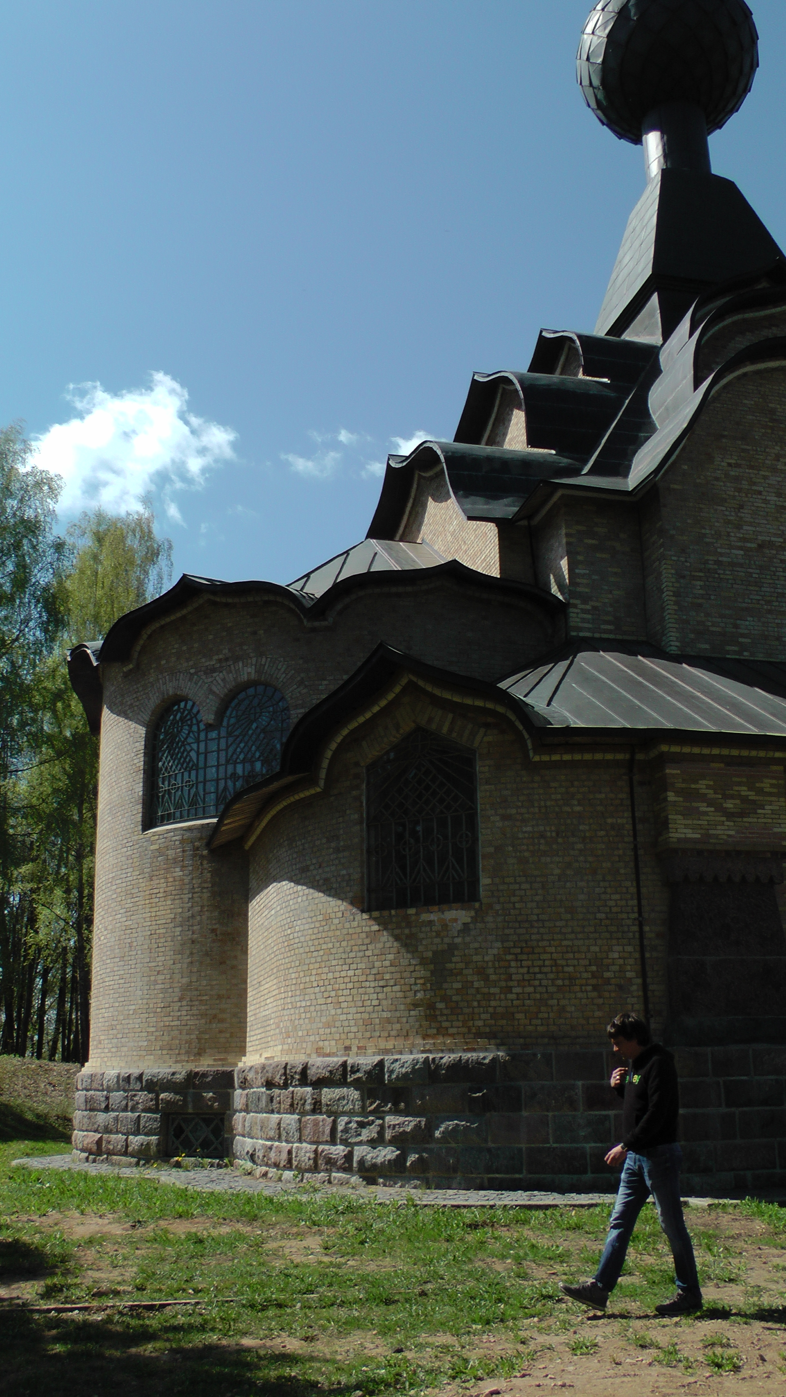 Алтарная часть храма Святого Духа в Талашкино. Архитектор С. В. Милютин.